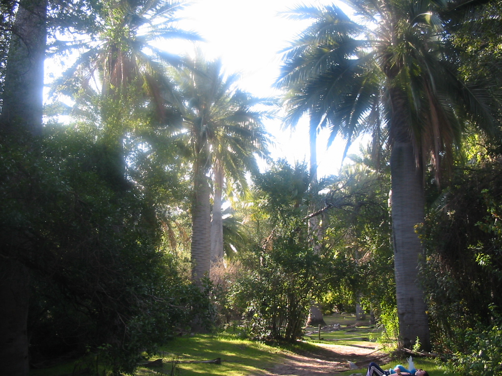 Jubaea chilensis. Sector Casino - Palmar de Ocoa. Parque Nacional La Campana. V Región. Chile